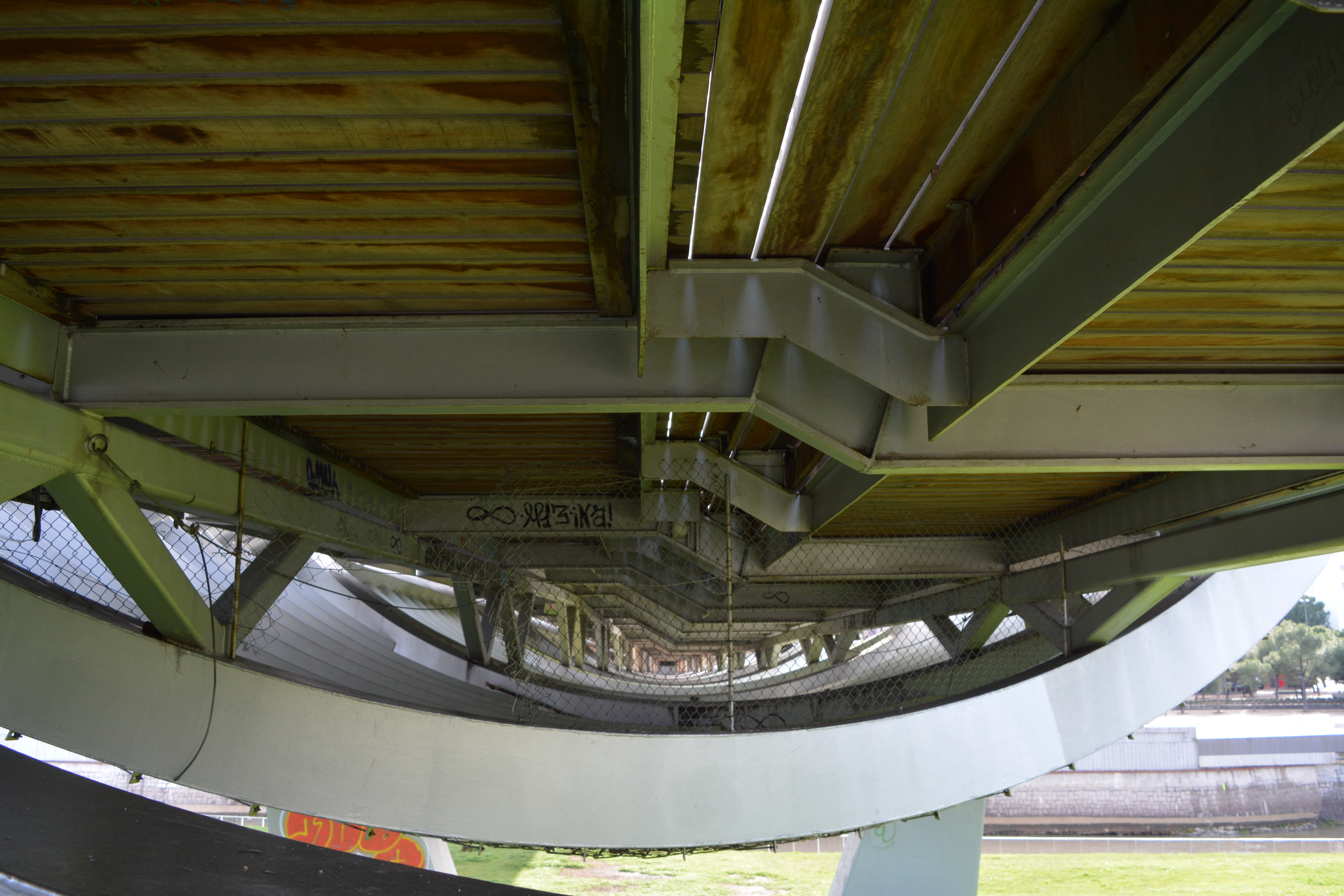 Vista inferior plataforma